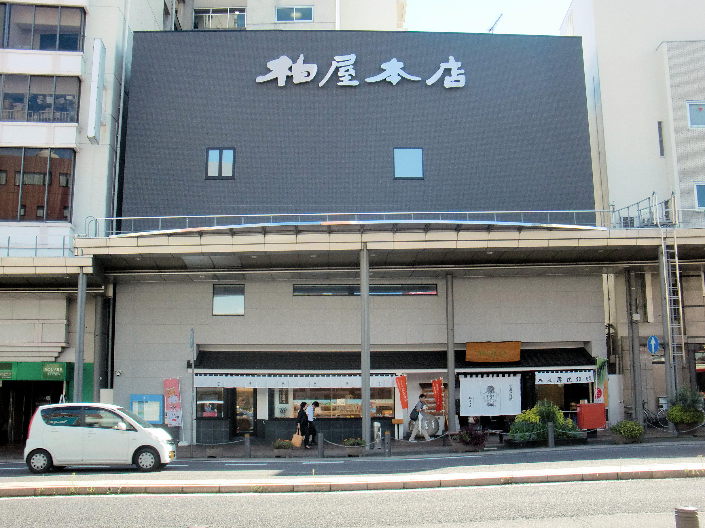 郡山市 薄皮饅頭等で知られる柏屋 本店